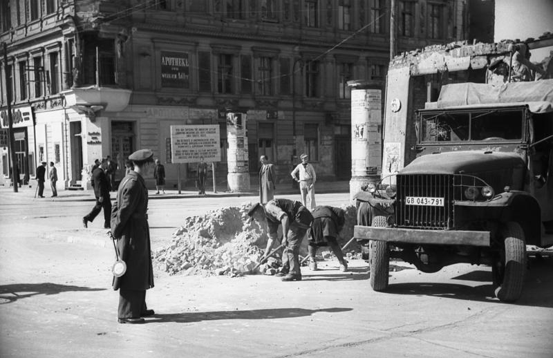 Berlin: Überall an den Übergangsstellen vom sowjetischen in die Westsektoren werden seit heute Vormittag (11.5.49) die Straßensperren beseitigt. UBz: Entfernung der Sperre an der Friedrichstraße und Zimmerstraße. Aufn.: Illus /Heilig 3234-49, 11.5.49